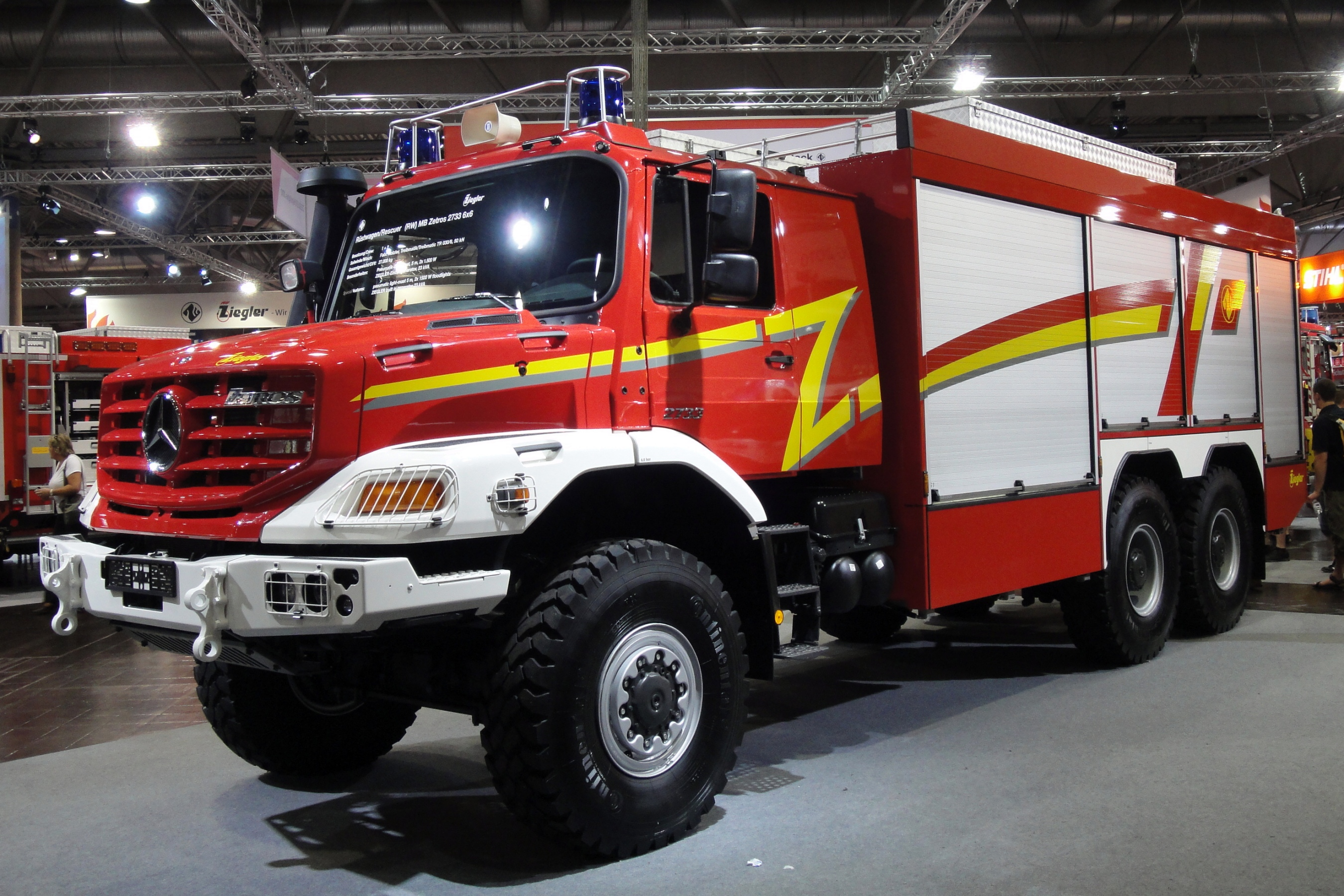 Ziegler Rüstwagen, Mercedes-Benz Zetros 2733 6x6, Interschutz 2010